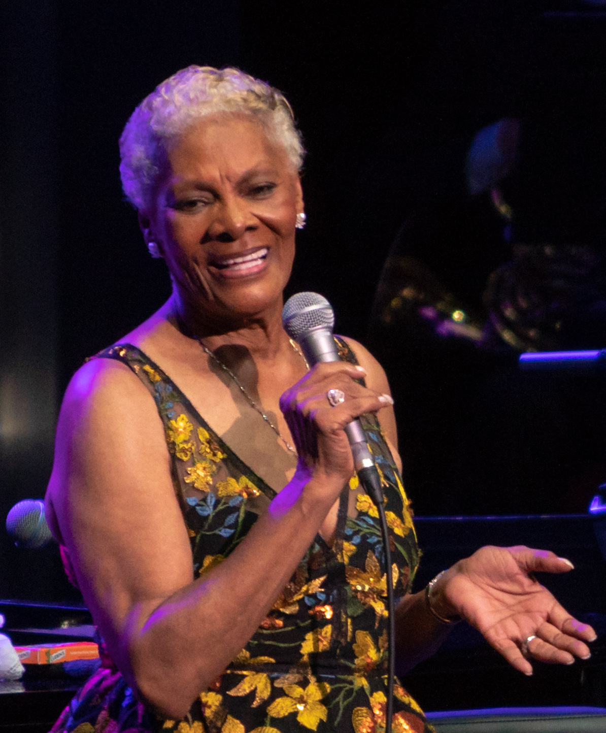 DionneWRAH180918-23